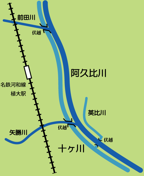 愛知県の阿久比町と半田市を流れる阿久比川・十ヶ川の伏越の説明図